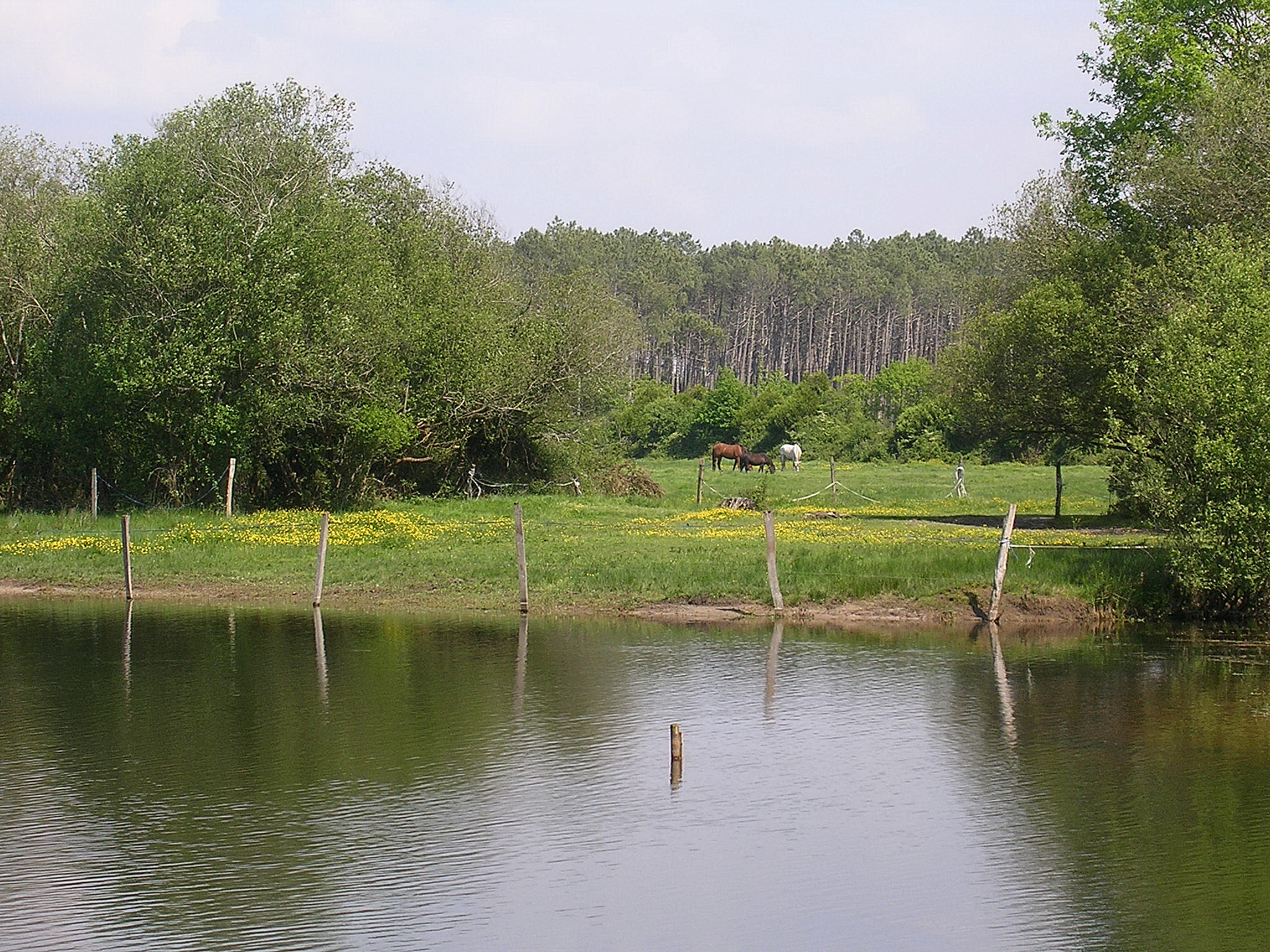 Étang de Bourg le Vieux à Bias, dans le département français des Landes